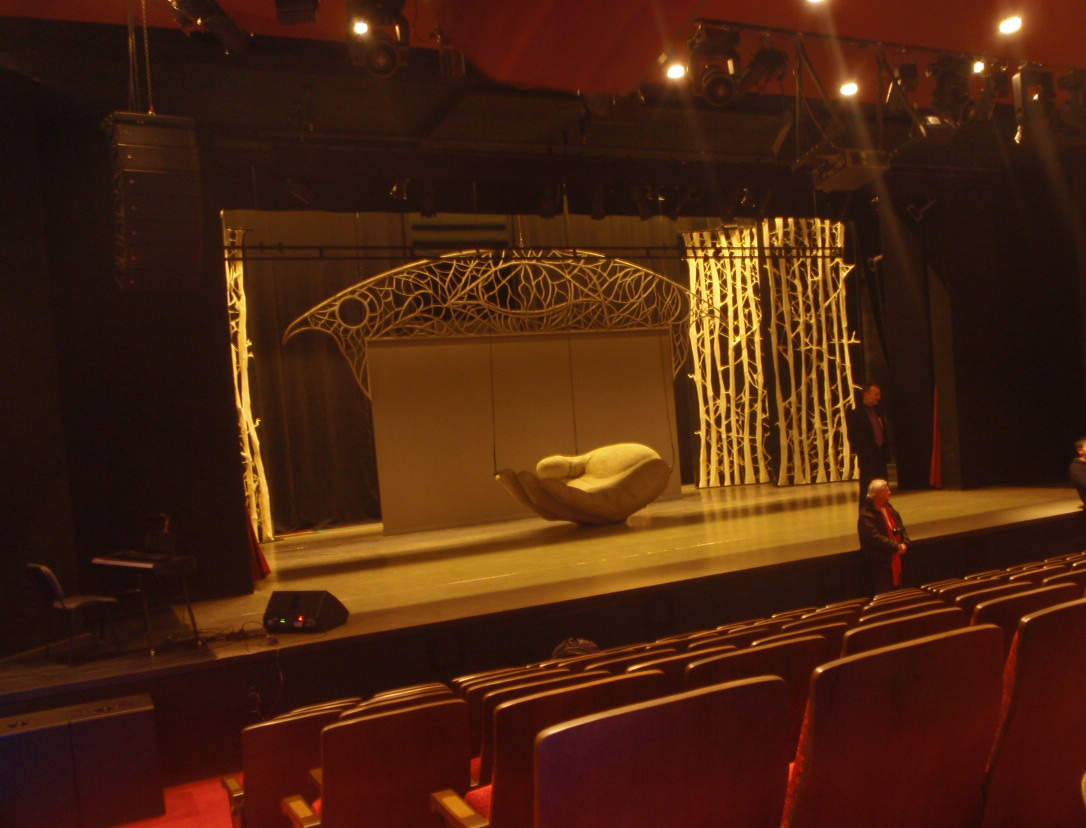 Szombathely, Weöres Sándor Színház színpad